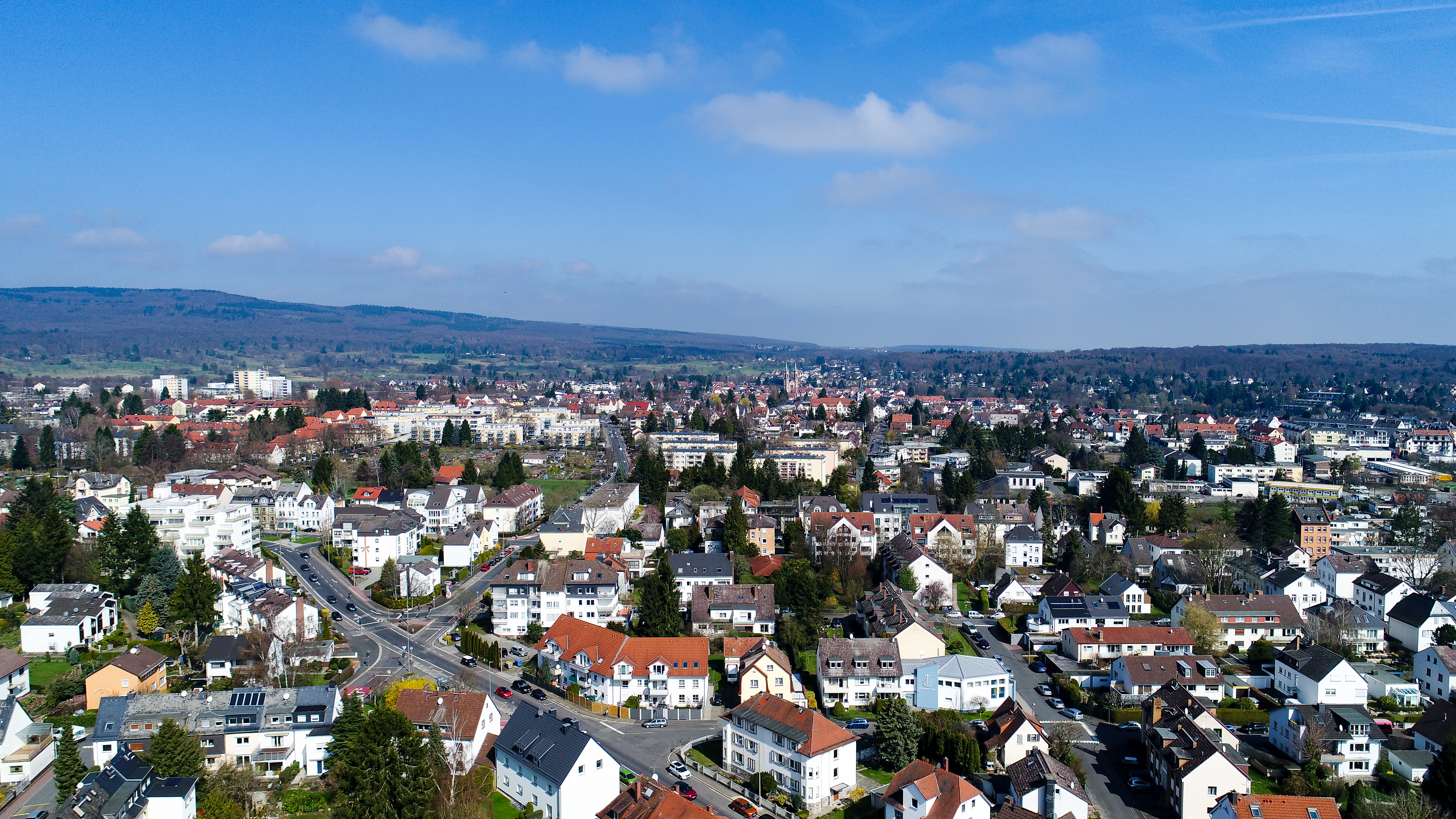 Luftbild von Bad Homburg, zwischen Gartenfeldsiedlung und Stadtmitte. Im Hintergrund Kirdorf mit dem Taunusdom